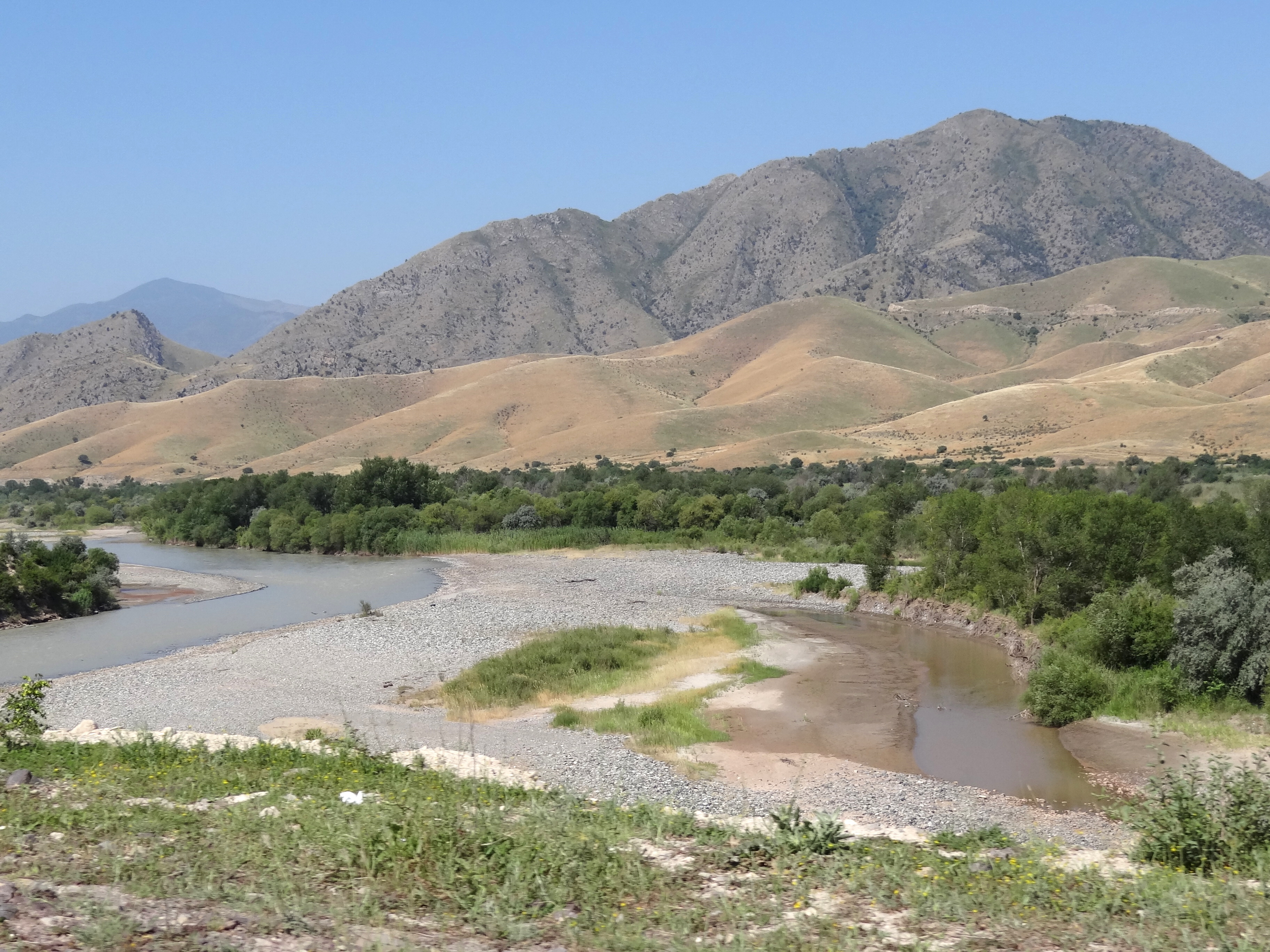 Aras River with Nagorno Karabakh-Azerbaijan at Right - Iran at Left - Iranian Azerbaijan - Iran